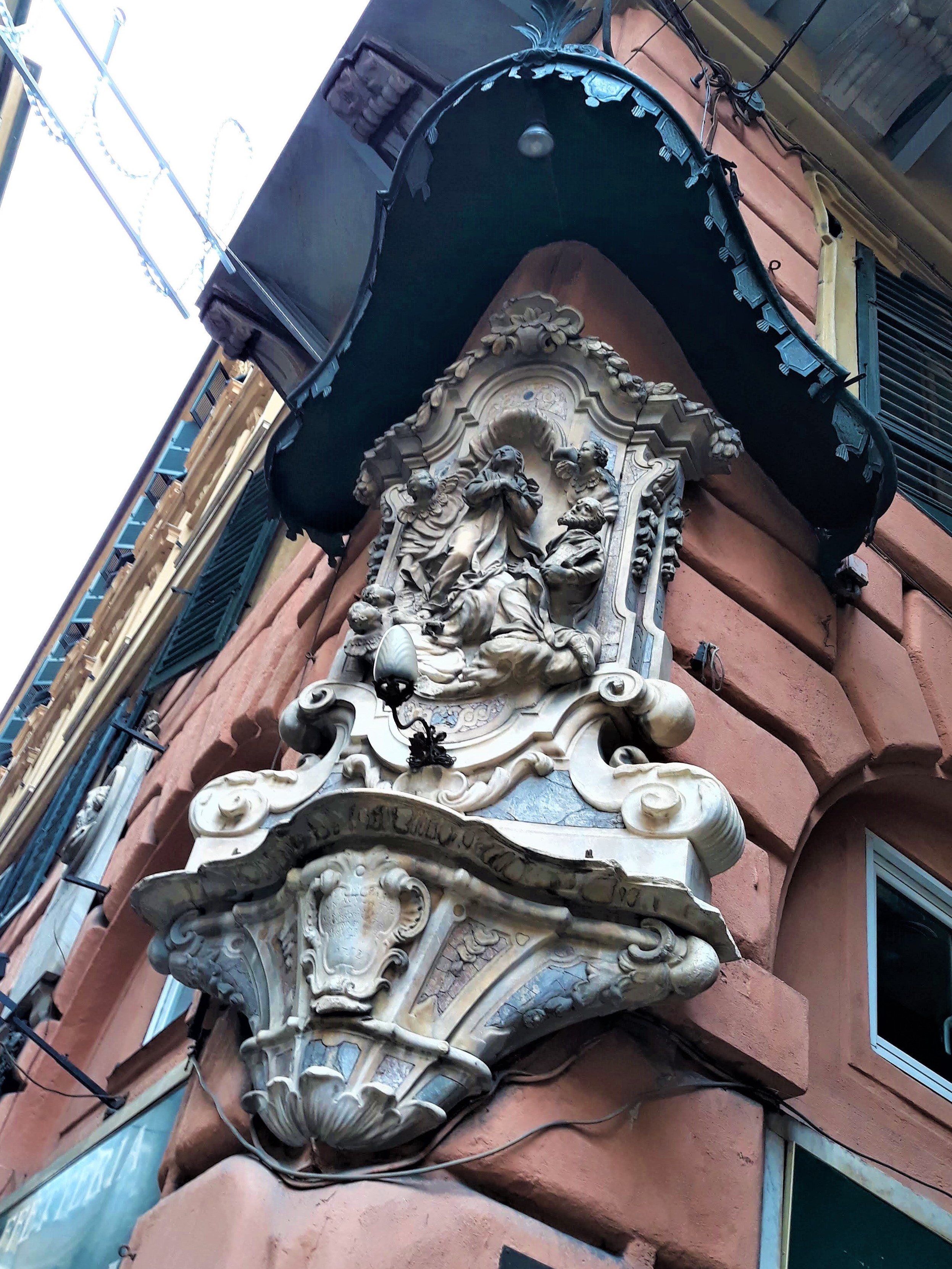 Piazza Banchi, angolo vico De Negri - Genova - Edicola Madonna e San Zaccaria